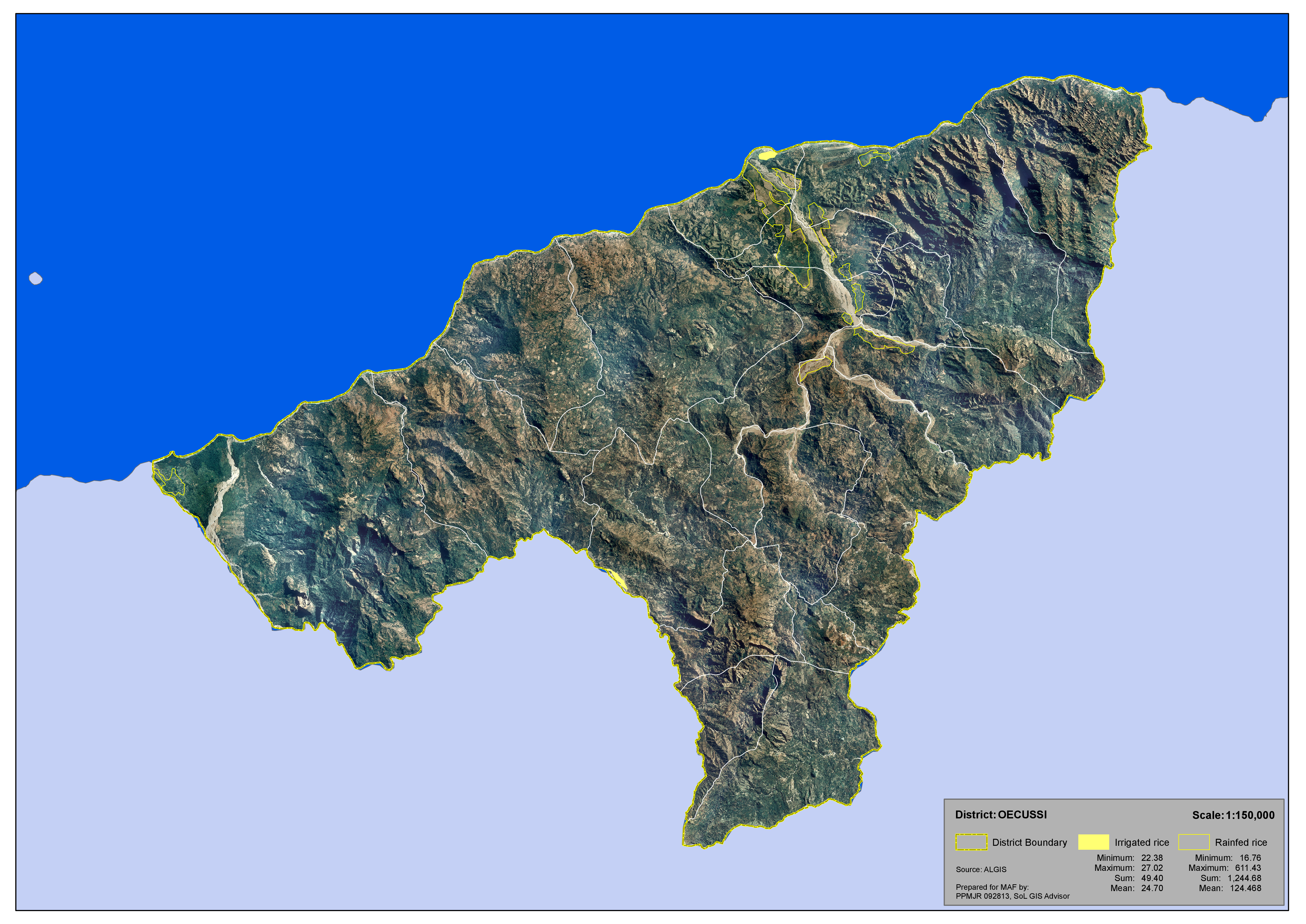 Reisfelder im Distrikt Oecusse